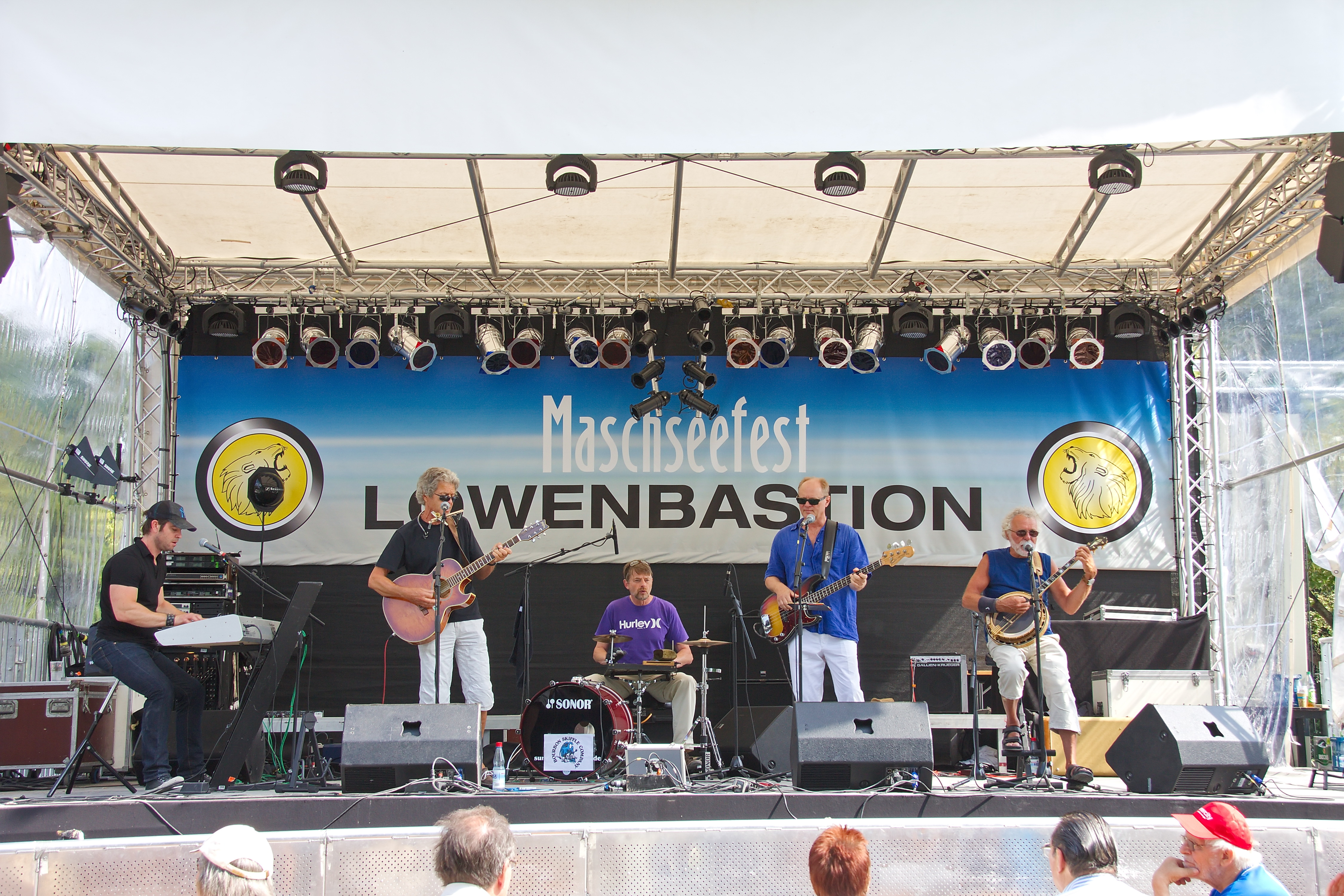 Bourbon Skiffle Company auf dem Maschseefest 2013 in Hannover (Niedersachsen)